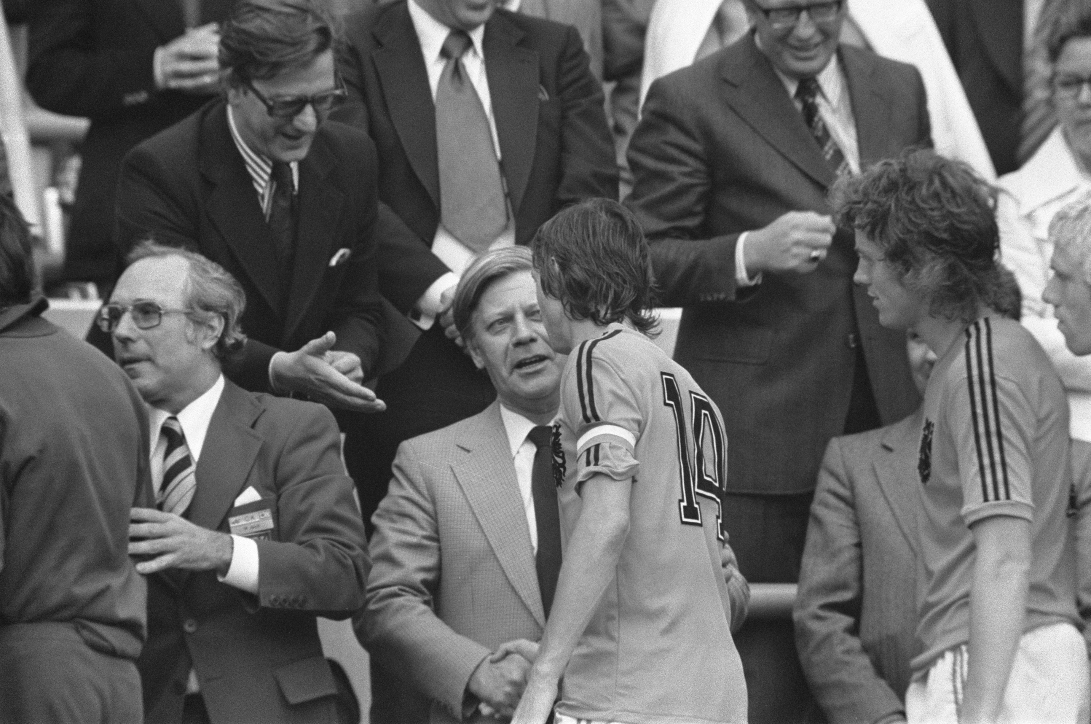 Collectie / Archief : Fotocollectie Anefo Reportage / Serie : [ onbekend ] Beschrijving : Finale wereldkampioenschap voetbal 1974 in Munchen, West Duitsland tegen Nederland 2-1; nr. 19 Cruijff geeft Scheel hand na afloop Datum : 7 juli 1974 Locatie : München, Nederland, West-Duitsland Trefwoorden : finales, sport, voetbal, wereldkampioenschappen Persoonsnaam : Cruijff, Johan Fotograaf : Verhoeff, Bert / Anefo Auteursrechthebbende : Nationaal Archief Materiaalsoort : Negatief (zwart/wit) Nummer archiefinventaris : bekijk toegang 2.24.01.05 Bestanddeelnummer : 927-3095